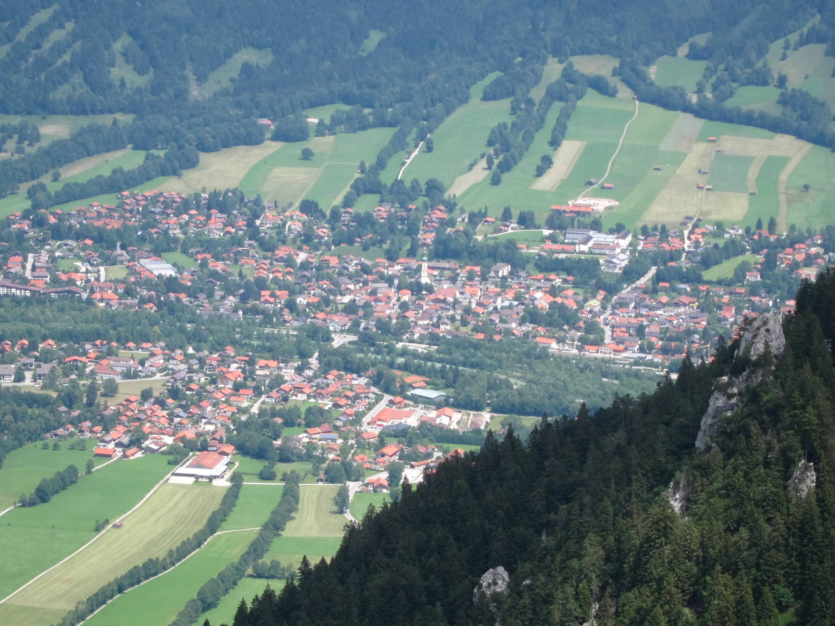 Blick vom Brauneck auf Lenggries